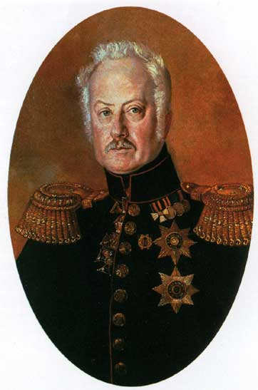 Неизвестный художник. Портрет Владимира Андреевича Глинки. Середина XIX в.